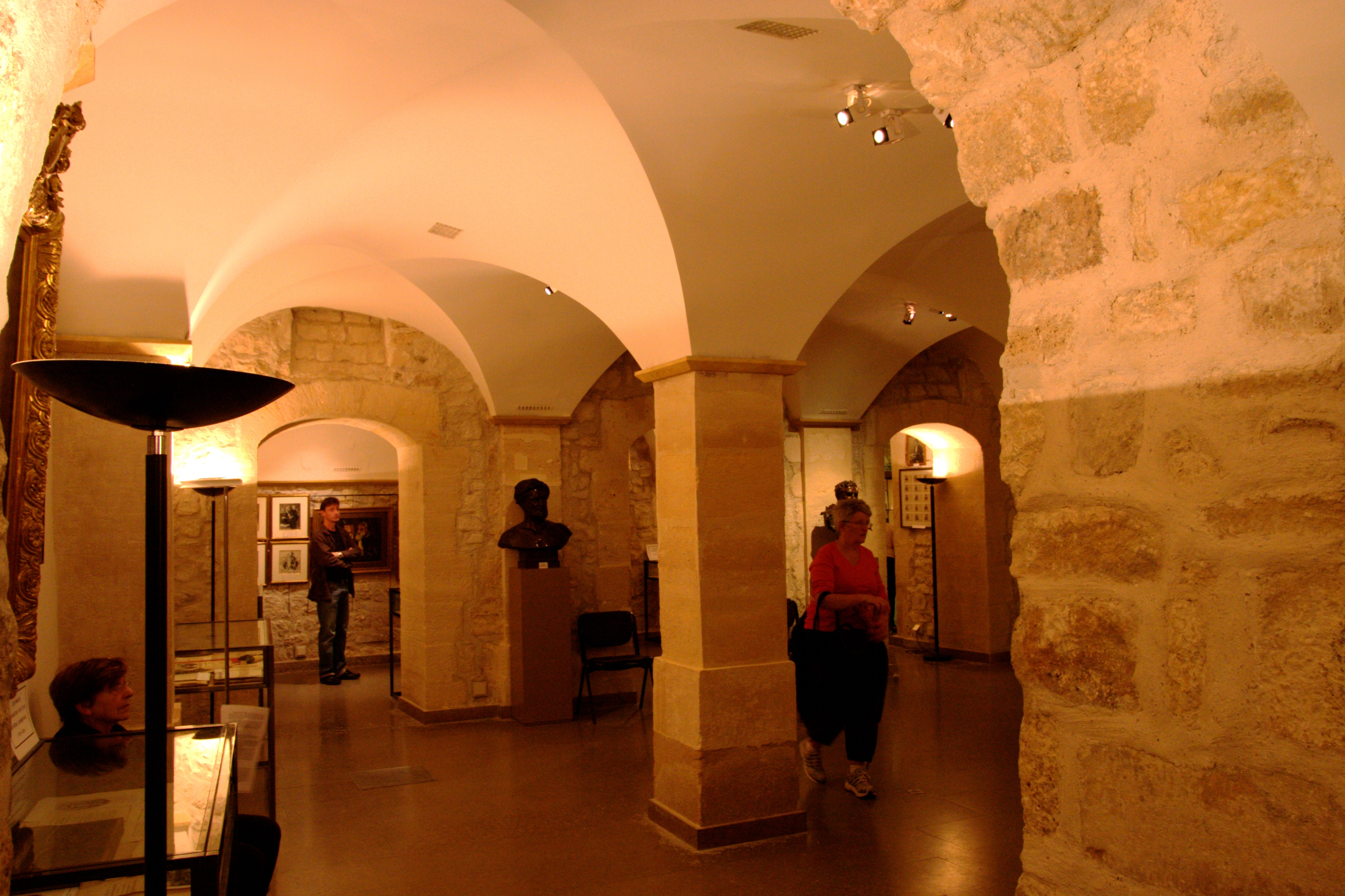 Hôtel de La Porte (monument historique), 25 rue du Jour Les caves voûtées qui abritent le musée du Barreau de Paris